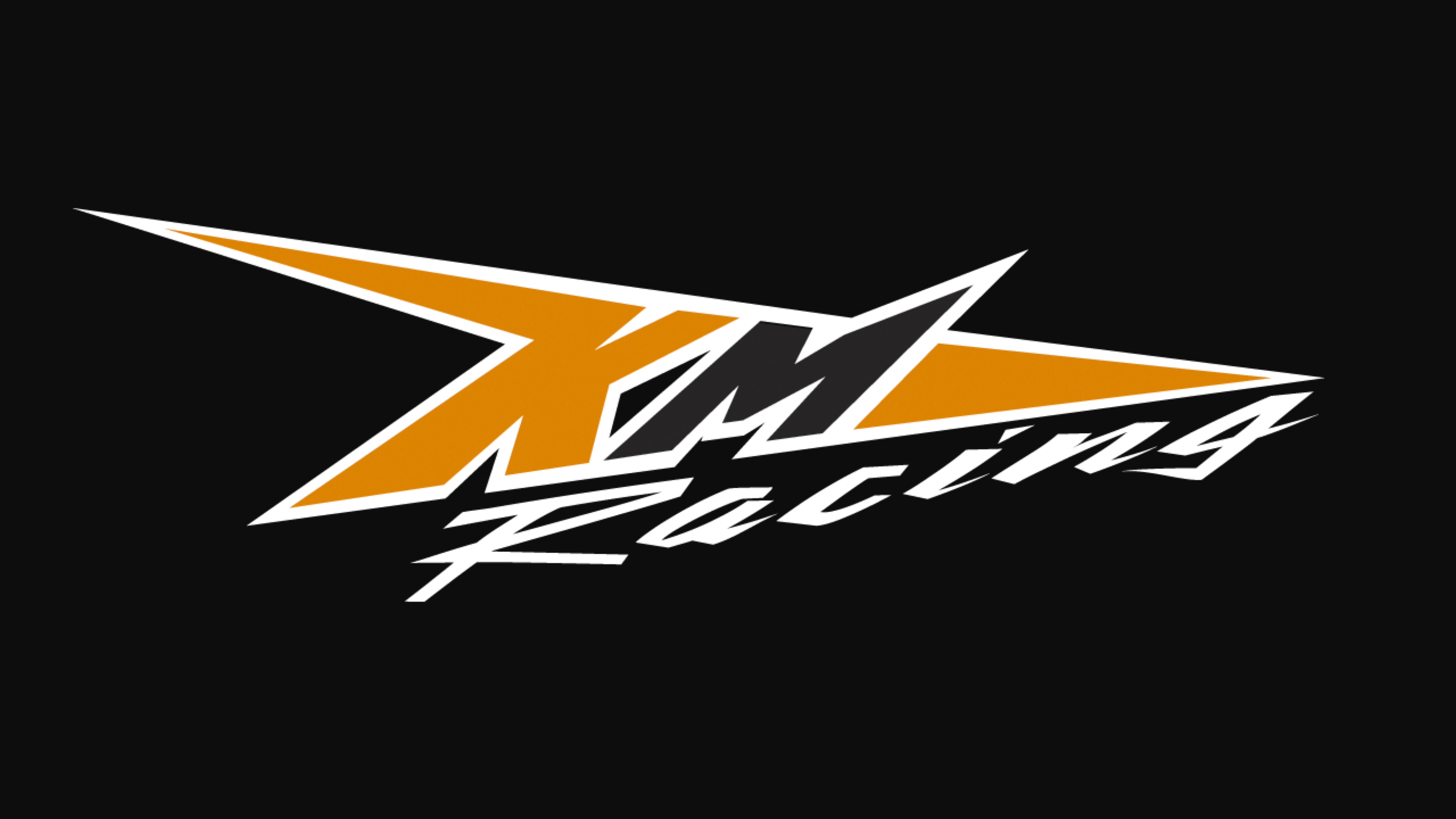 KMR logo černé pozadí